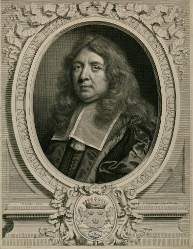 Claude Bazin de Bezons (1617-1684), avocat et homme d'État français du 17 siècle.